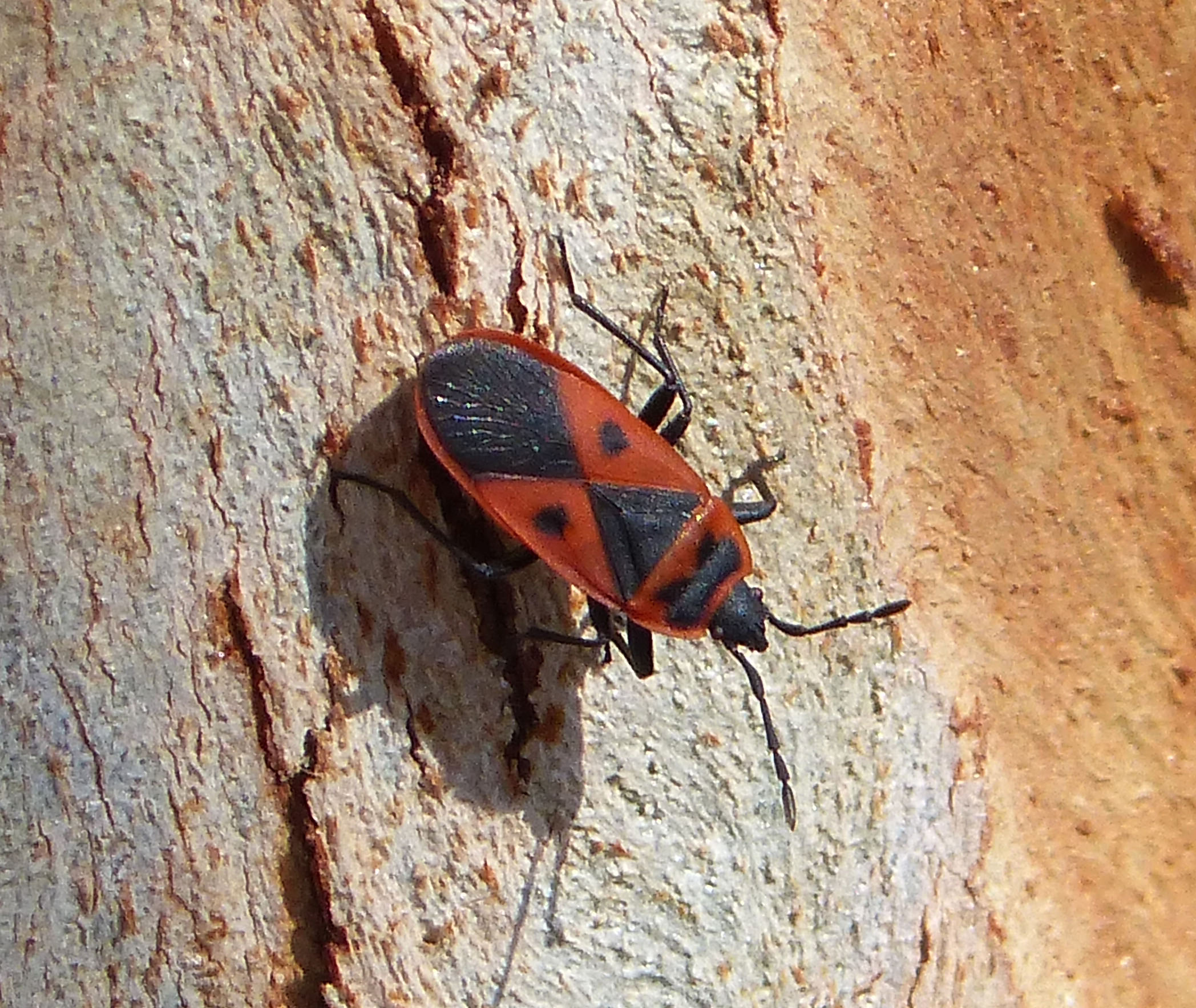 Alcornocales N.P. Andalucia, Spain